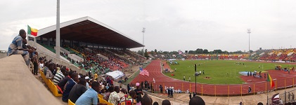 Stade charles de Gaulle de Porto-Novo Bénin